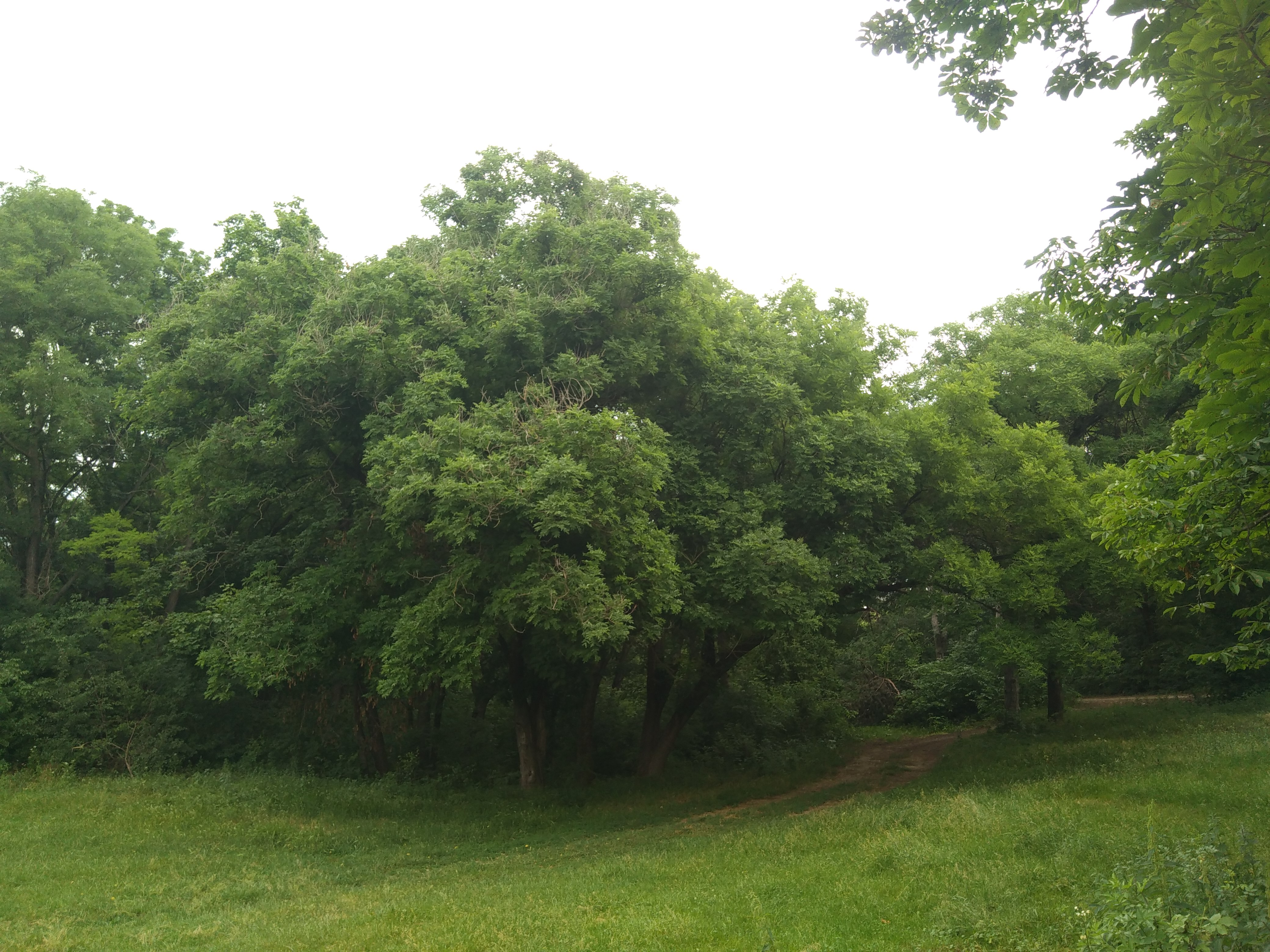 Parcul din satul Bălăbănești, monument al naturii amplasat în raionul Criuleni, satul Bălăbănești (cod MD-CR-map-007)